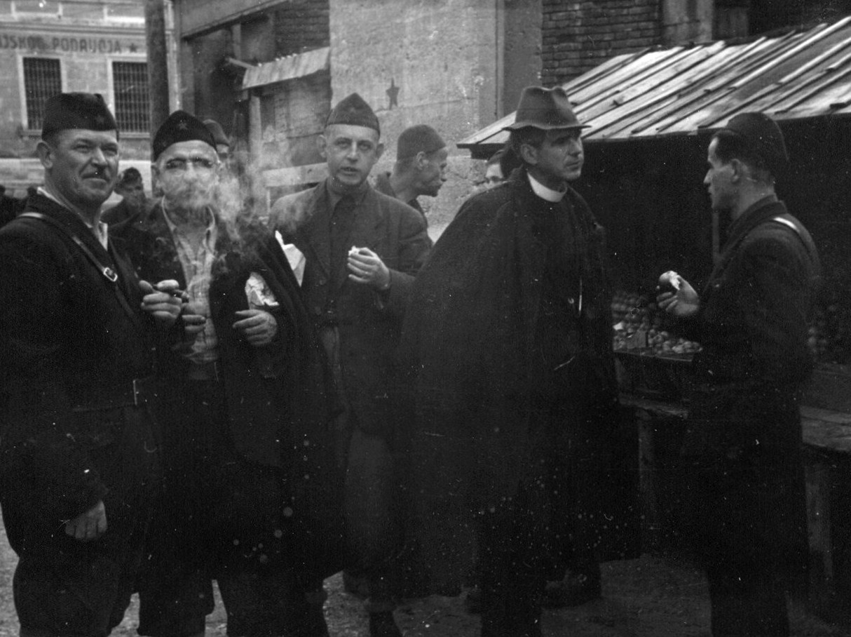 Srpskohrvatski / српскохрватски: Ivan Novak Očka, Josip Rus, Lado Vavpetič, Svetozar Ritig i Tone Fajfar u Livnu.